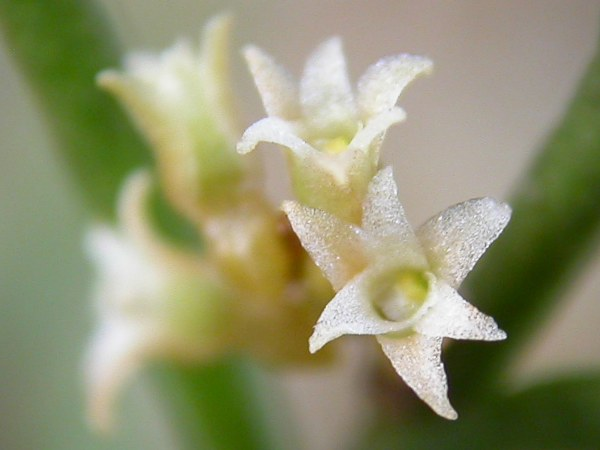 Campylocentrum aciculatum de Minas Gerais